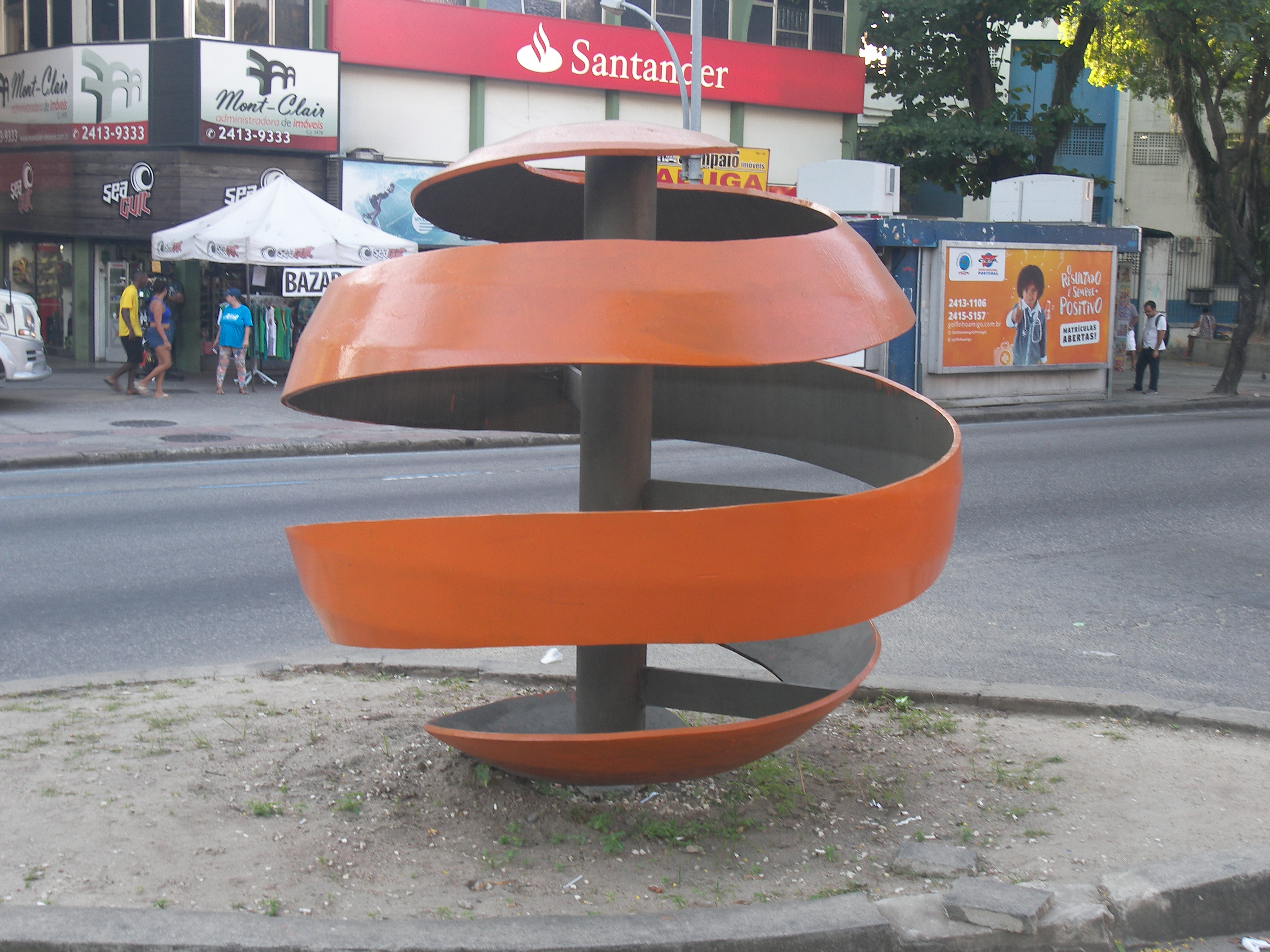 Monumento da Laranja na esquina da Avenida Cesário de Melo com Rua Olinda Elis, em Campo Grande, Rio de Janeiro.